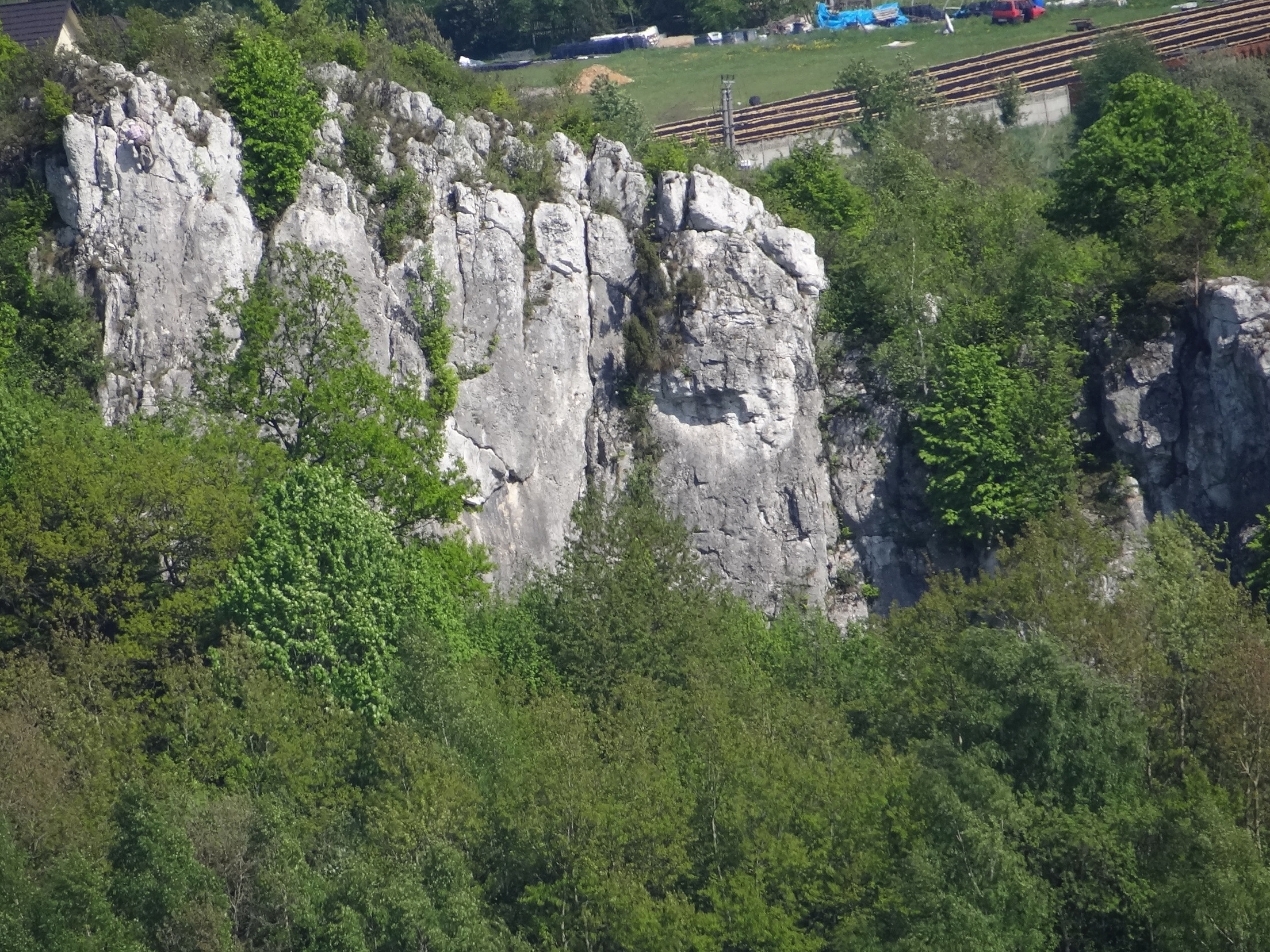 Psiklatka. Widok z Wzgórza 502